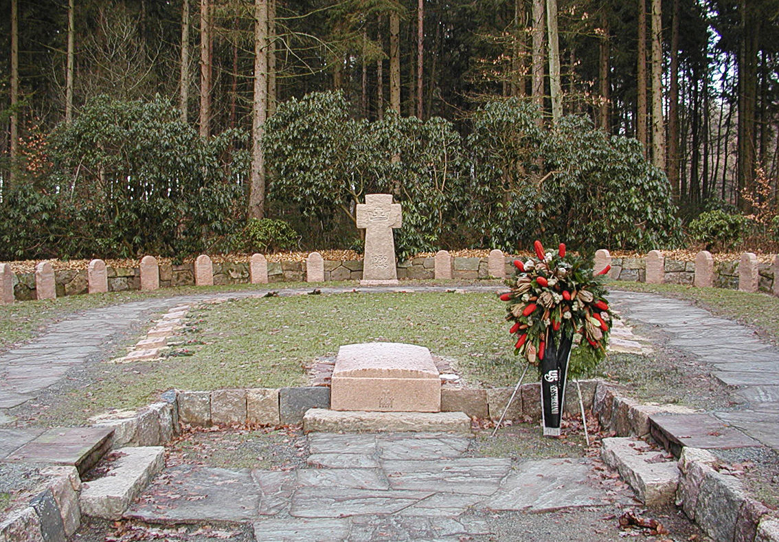 Am Eingang steht auf einer Gedenktafel: Hier ruhen 22 Soldaten einer Einheit der G.D.Verbände. Sie starben nach Kriegsende am 27.05.45 durch ein Explosionsunglück beim Räumen des Munitionslagers in der Zementfabrik Hemmoor. Ferner 31 Soldaten anderer Verbände, die hierher umgebettet wurden.